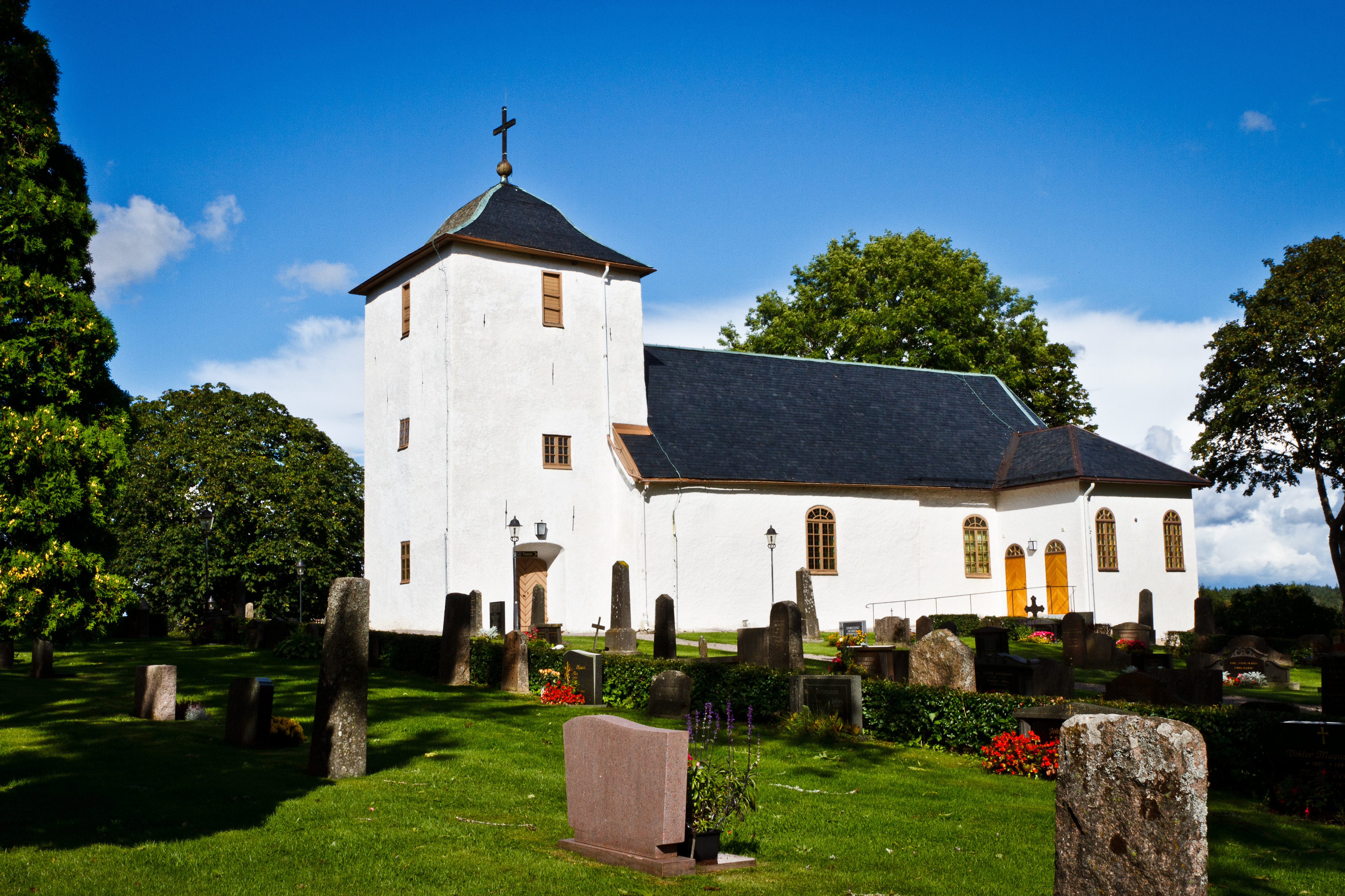 Ödeborgs kyrka (Ödeborgs Stom 2:1)